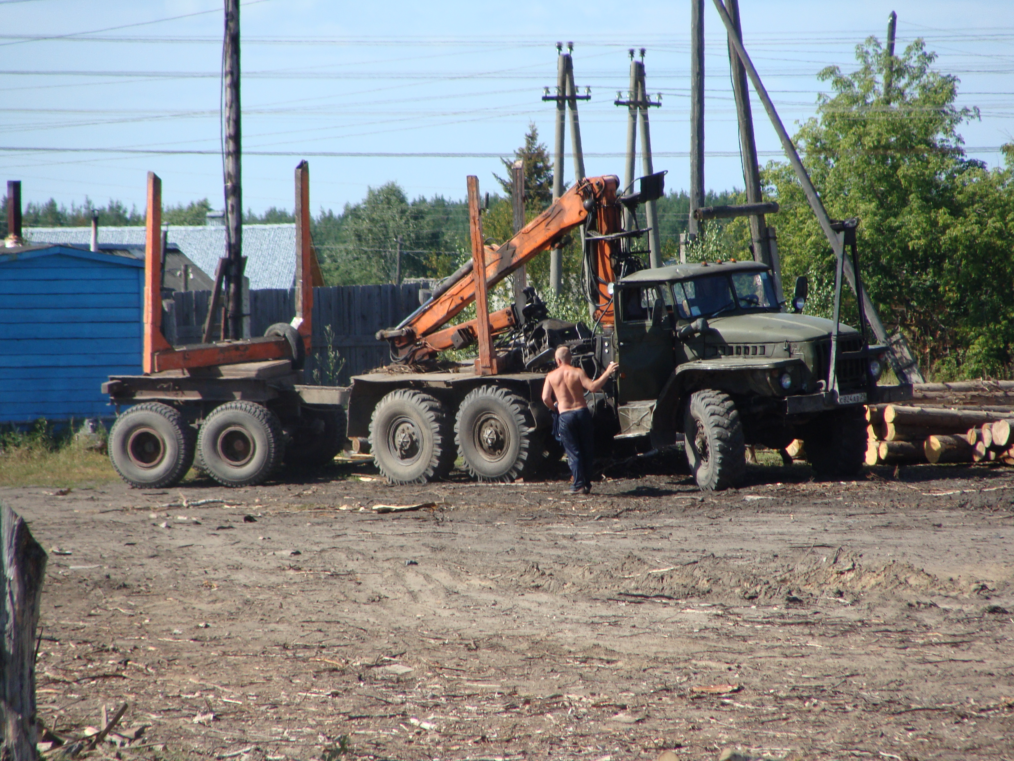 п. Черемушский Котласского района Архангельской области